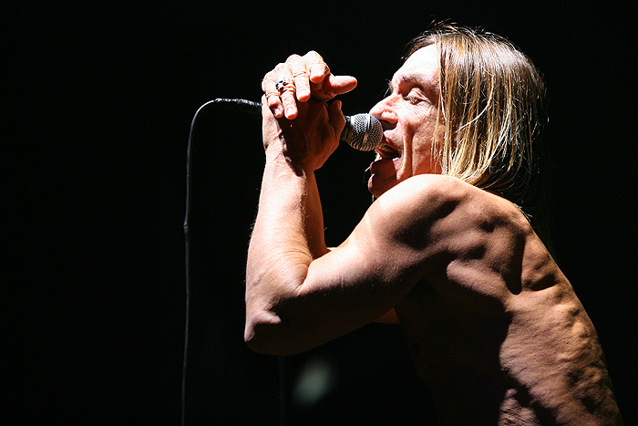 Iggy Pop